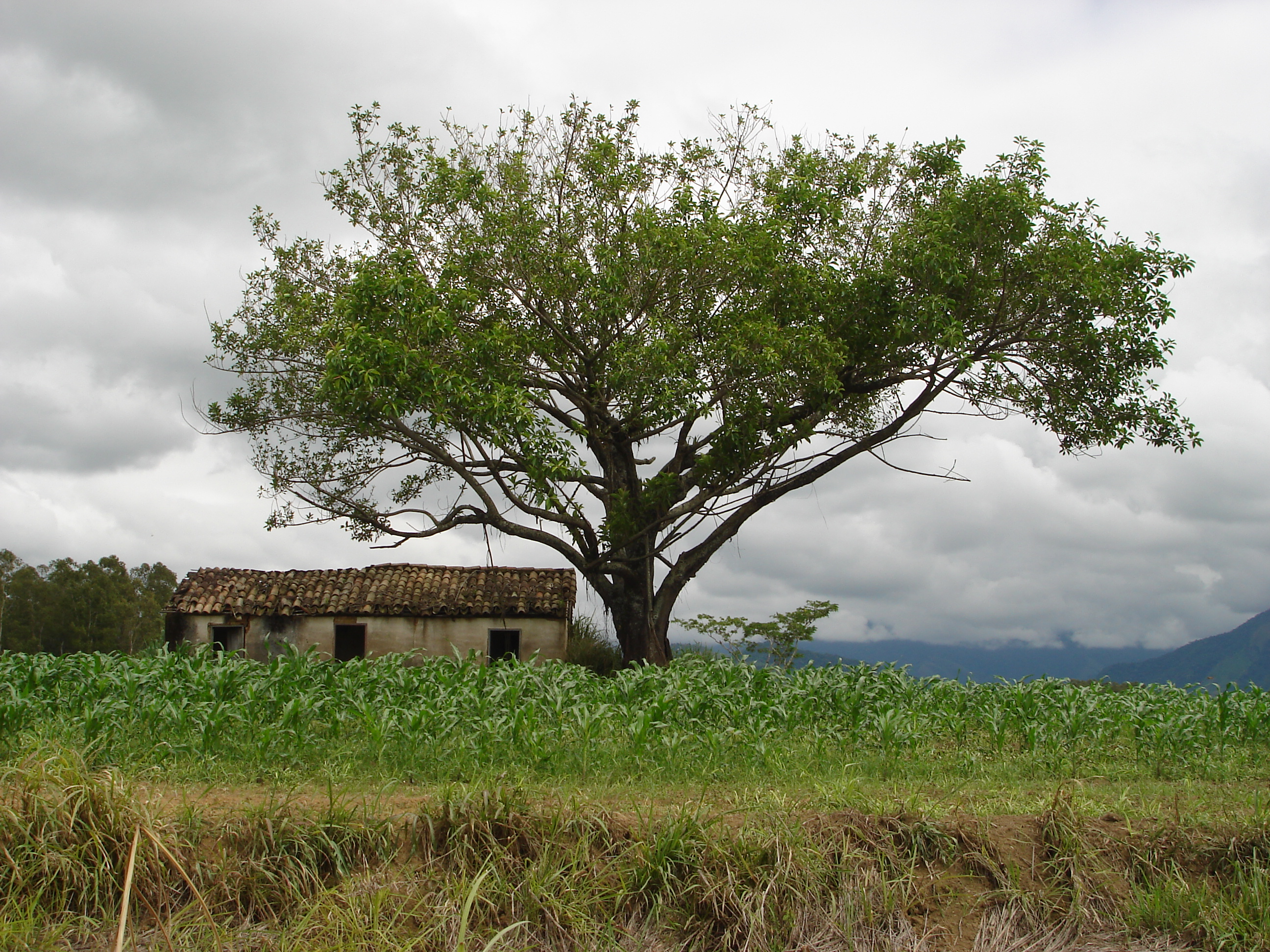 paisagem rural de pindamonhangaba